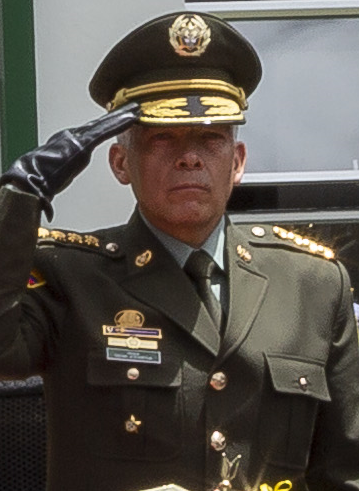 General Oscar Atehortúa Duque